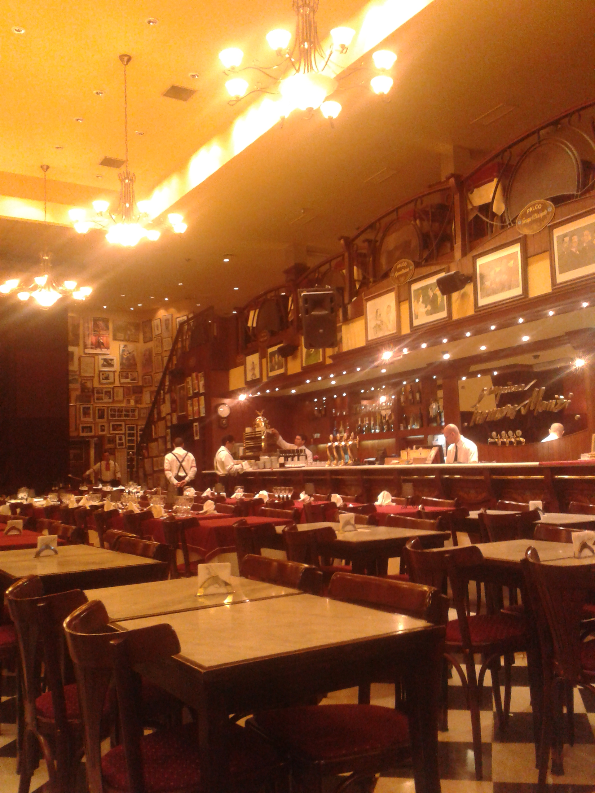 Interior del bar notable Esquina Homero Manzi.